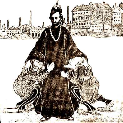 Неизветный художник. «Последний оплот (Гапон, Витте, Дурново)». Рисунок из журнала «Зарницы», 1906 г., №5.